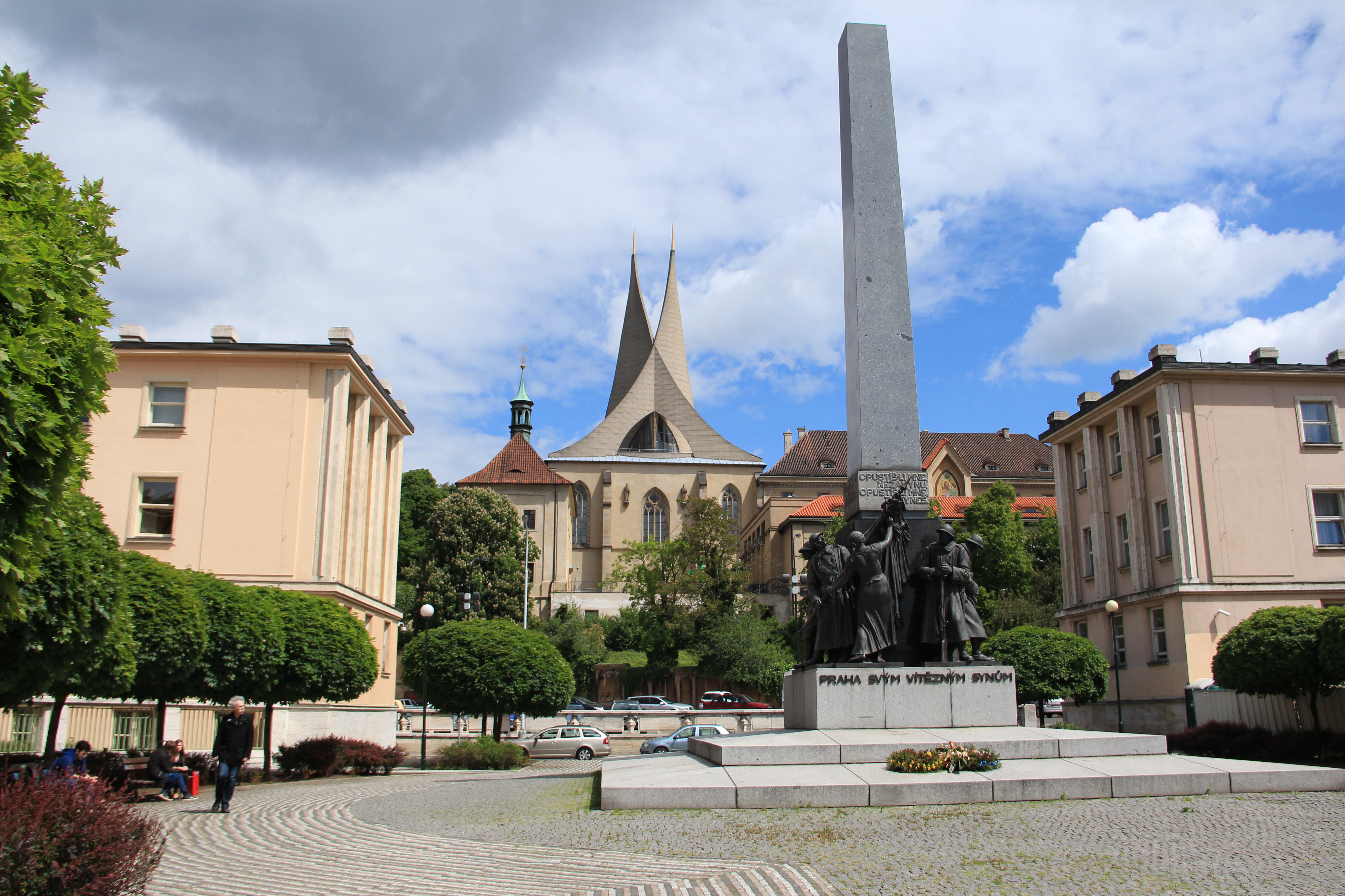 Kostol Panny Márie na Slovanoch